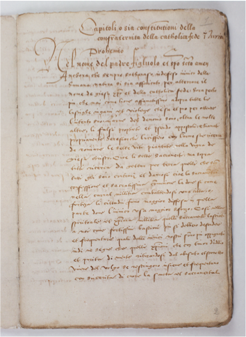 La storia della Compagnia di San Paolo ha inizio il 25 gennaio del 1563: l’immagine ritrae la pagina iniziale dell’atto costitutivo della “Confraternita della catholica fede in Turino”. Leggendo i capitoli dello statuto si comprendono le finalità che animarono i sette cittadini torinesi che la fondarono: soccorrere la popolazione gravata dalla miseria e arginare l’espansione della riforma protestante.